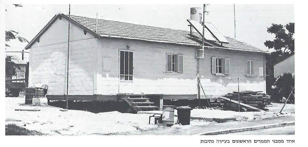 1956 משפחת שקד בנתה בתים בעיירה נתיבות בשנת